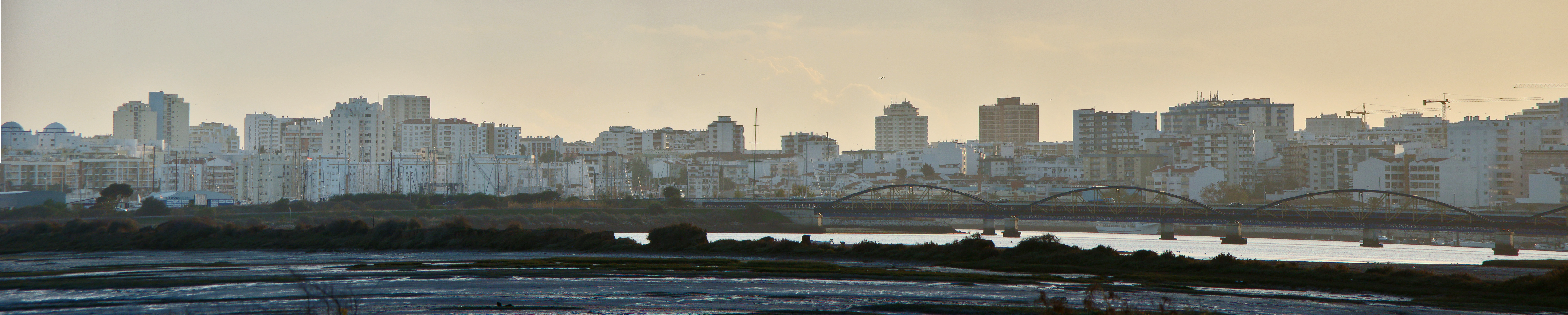 Panorama de Portimão